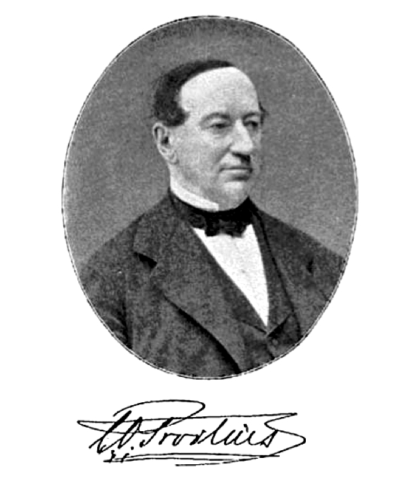 Image scanned from the book "Geologiska Föreningen i Stockholm Förhandlingar", published 1900